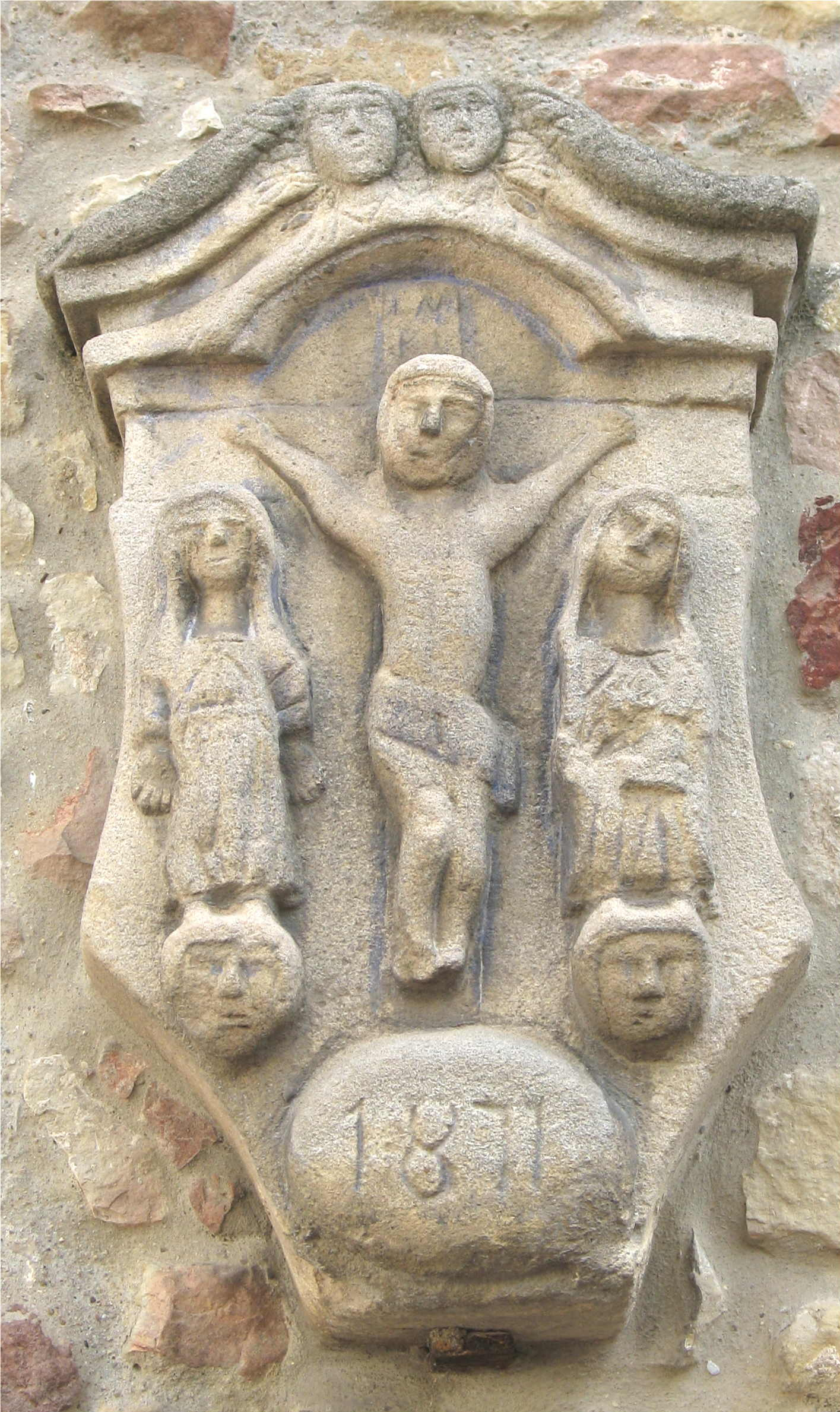 Kräiz op dem Musée a Possen